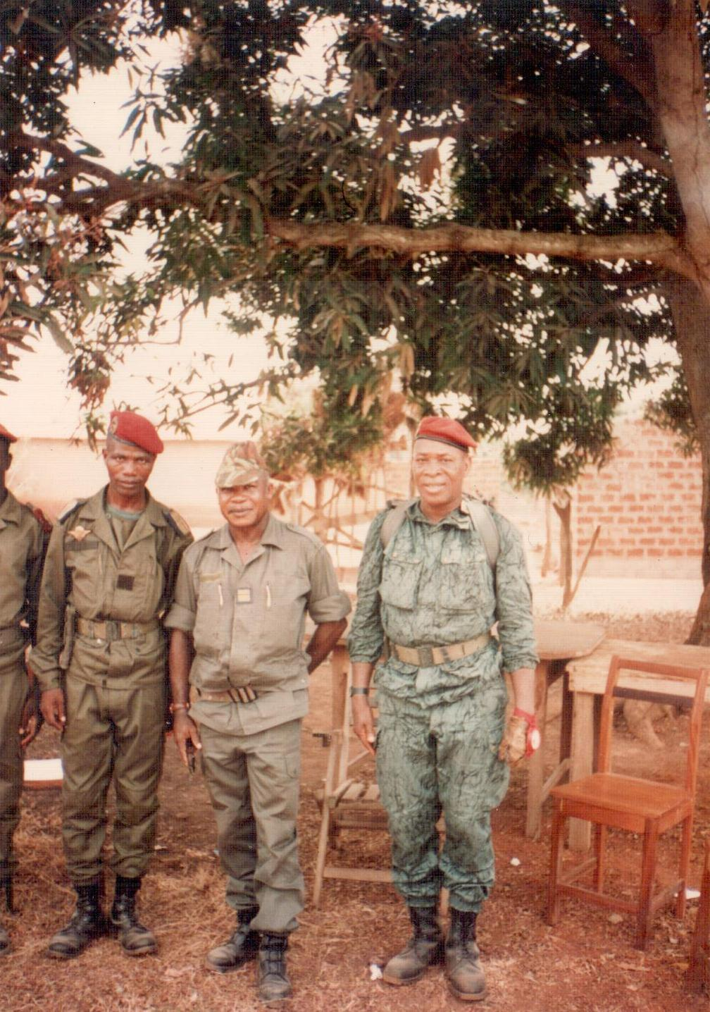 Manœuvre militaire